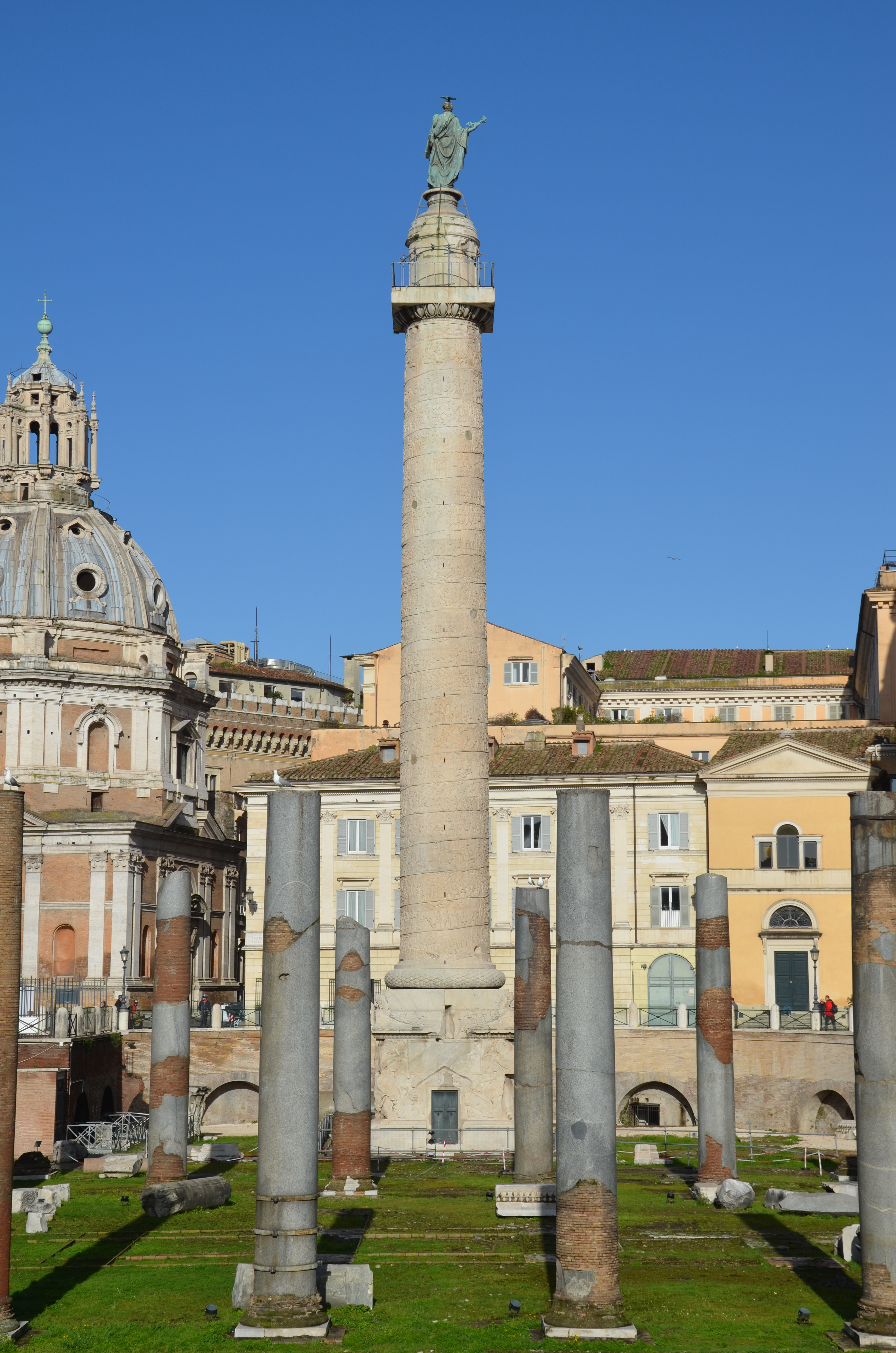 Trajan's Column, Rome